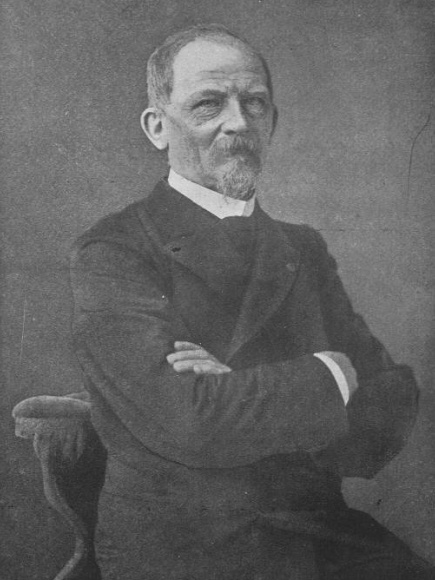 Portrait d'Adrien de Montgolfier-Verpilleux - 1831 - 1913